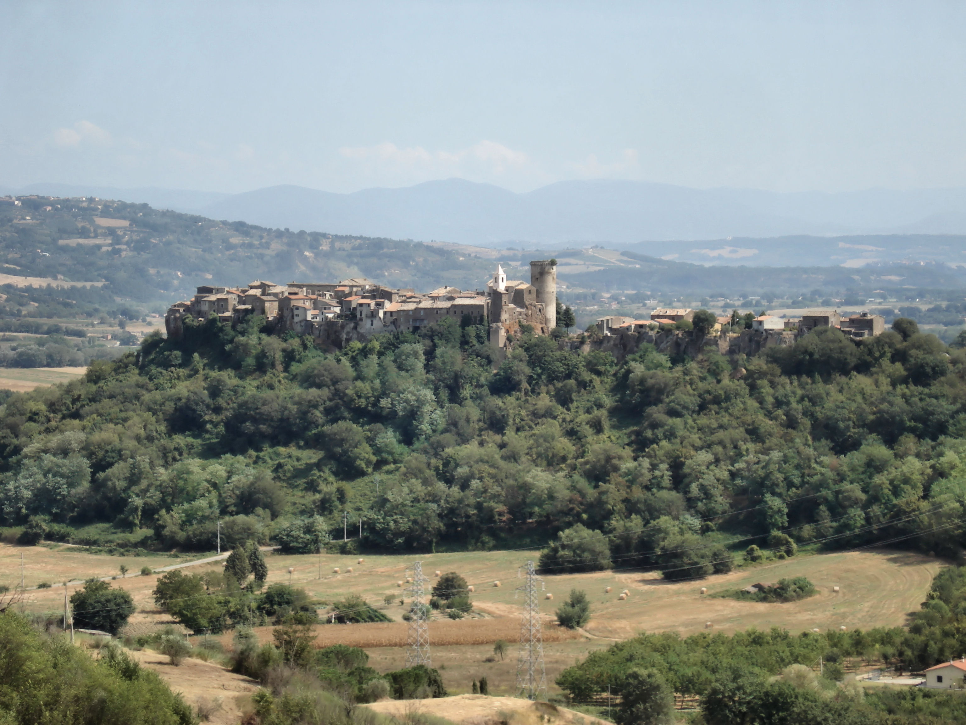 Cosmin latan,Mugnano in Teverina